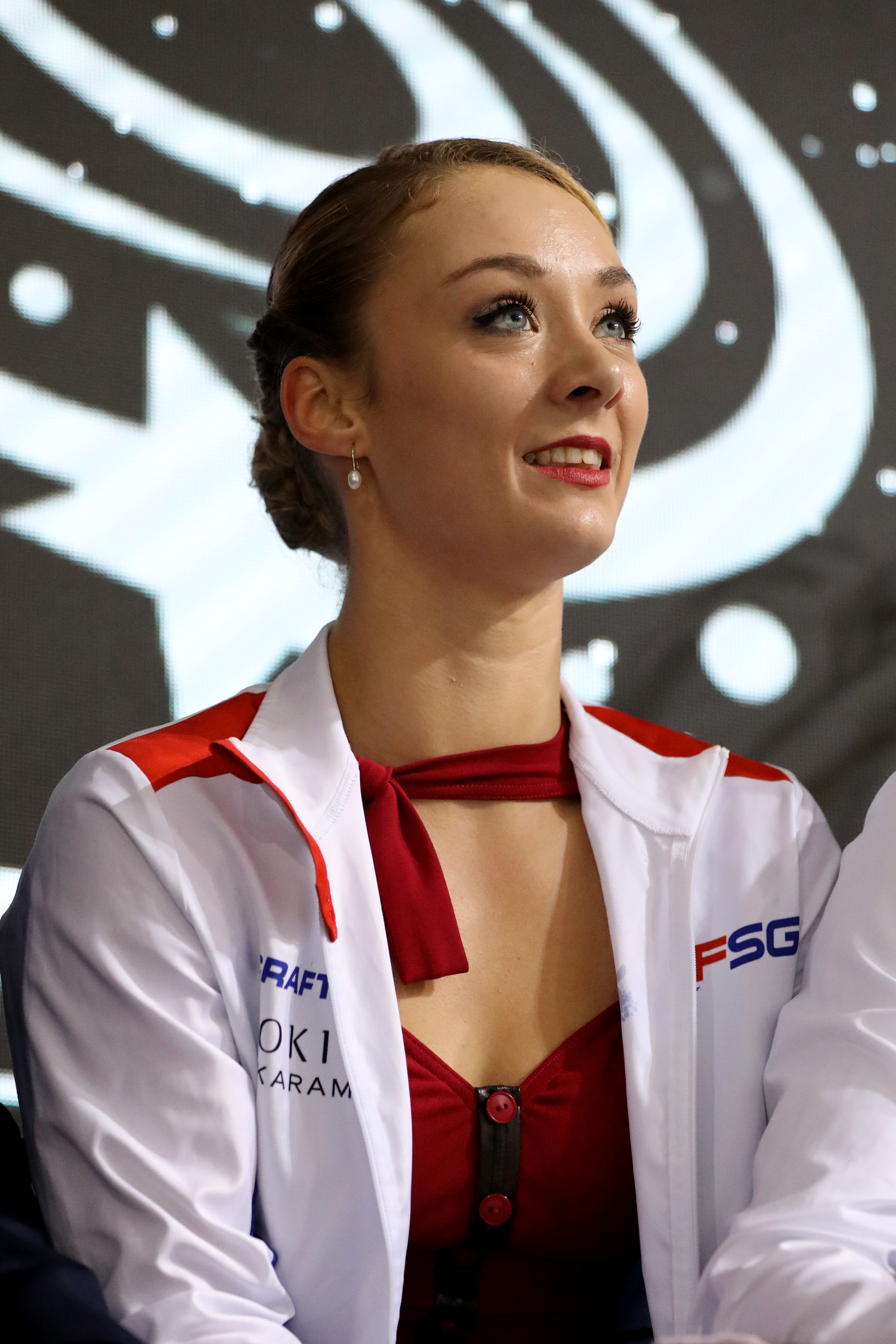 Wagret au kiss&cry des Internationaux de France 2019.